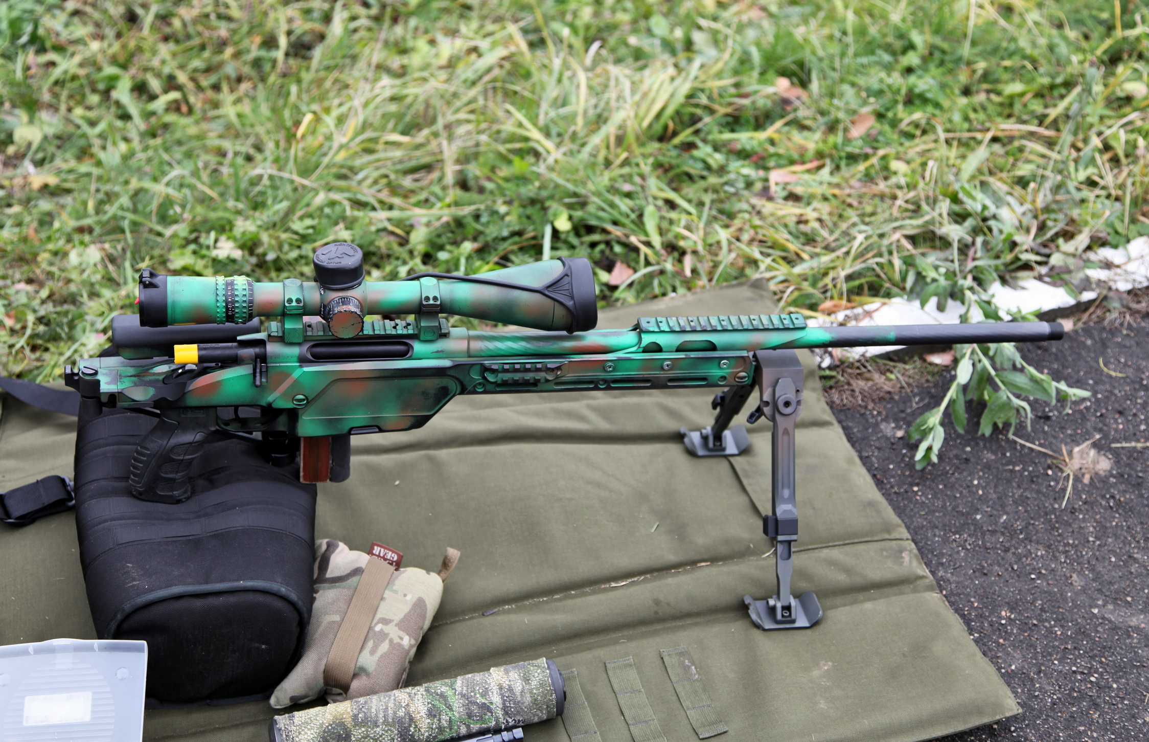 Steyr SSG 08 .300 Win.Mag